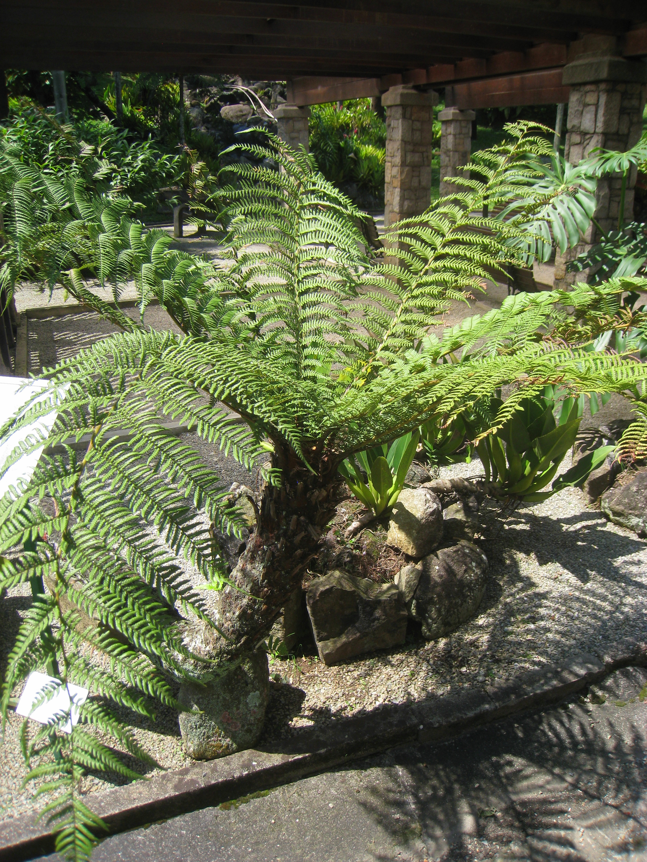 Dicksonia sellowiana in the Jardim Botânico de São Paulo, São Paulo City, SP, Brazil.